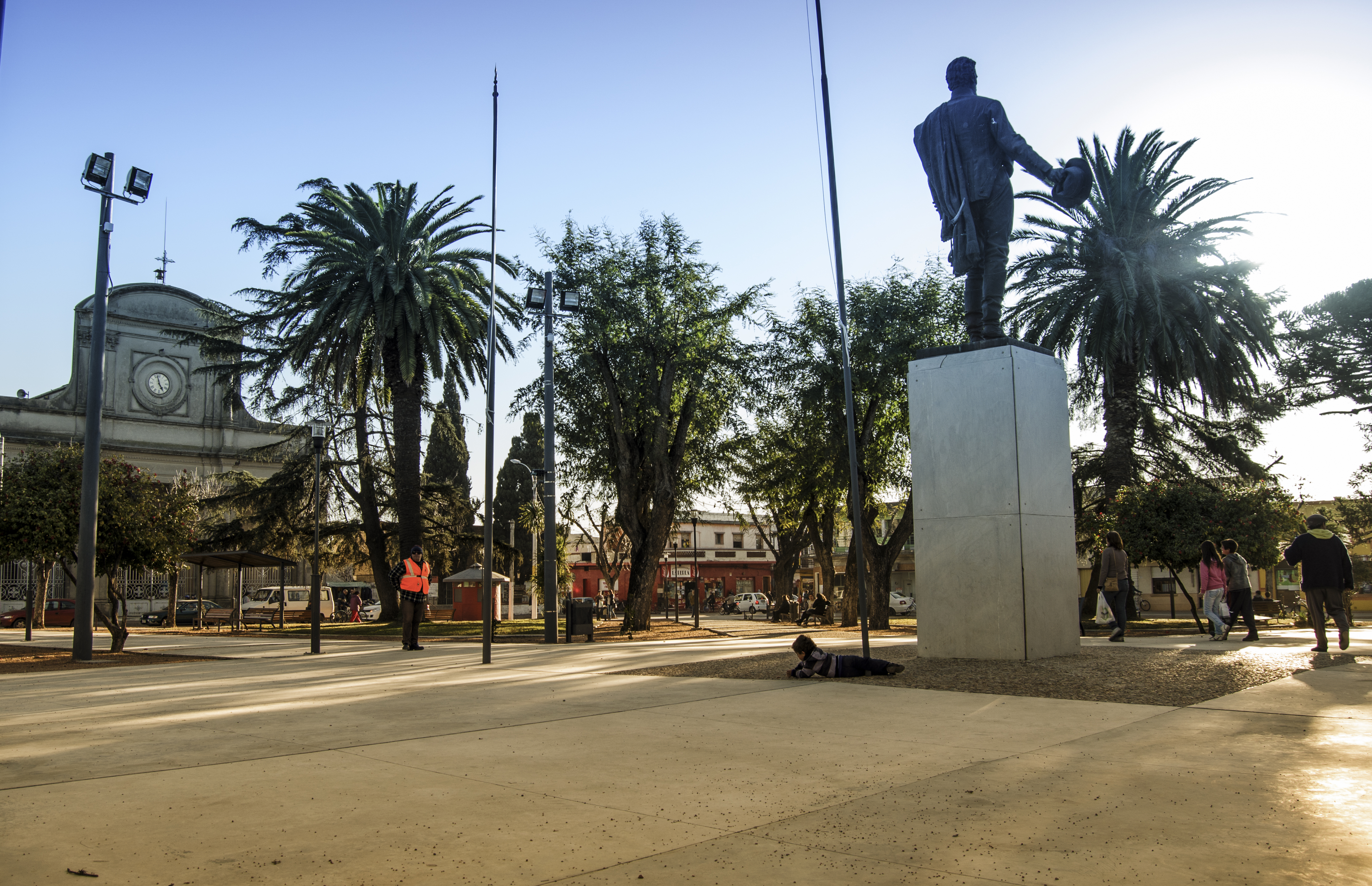 Plaza Tomás Berreta. Ubicada en el departamento de Canelones